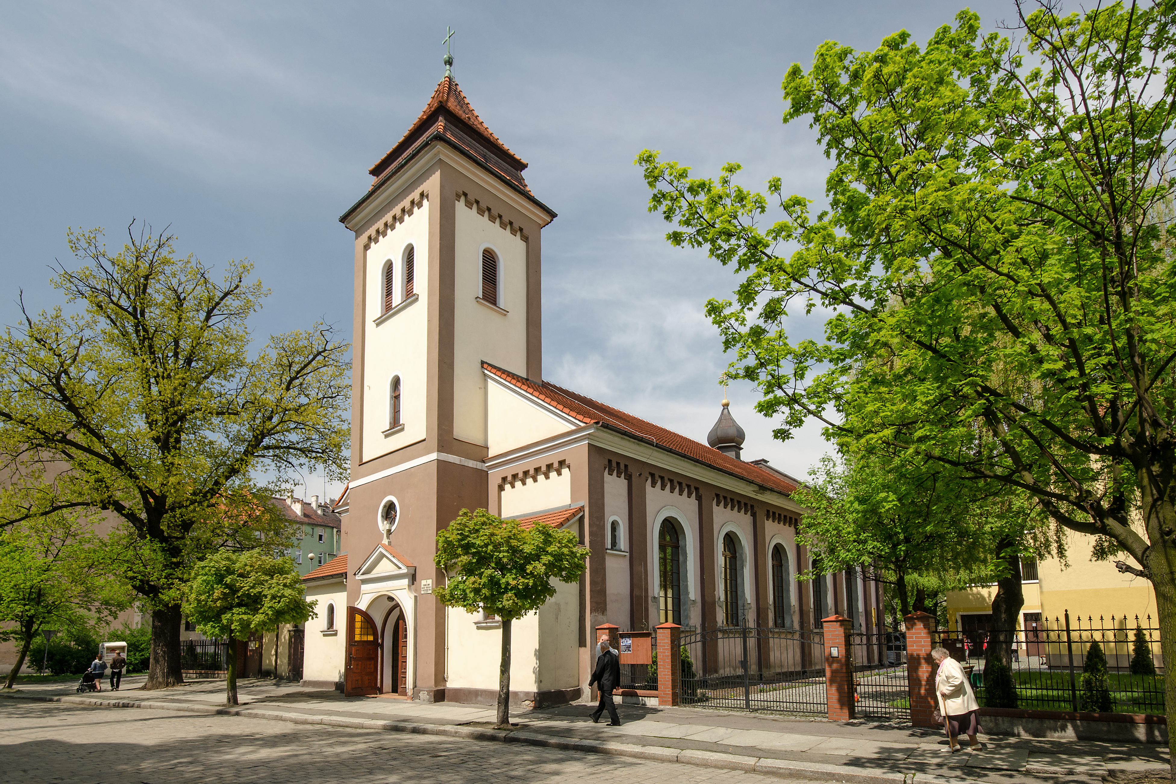 Legnica, kościół staroluterański, ob. cerkiew prawosł. par. pw. Zmartychwstania Pańskiego, 1847, 1912